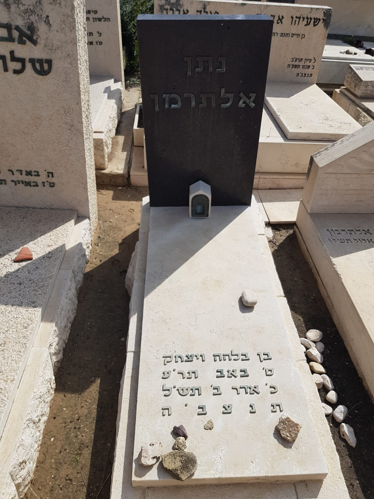 קברו של המשורר נתן אלתרמן בבית העלמין קרית שאול בתל אביב-יפו.